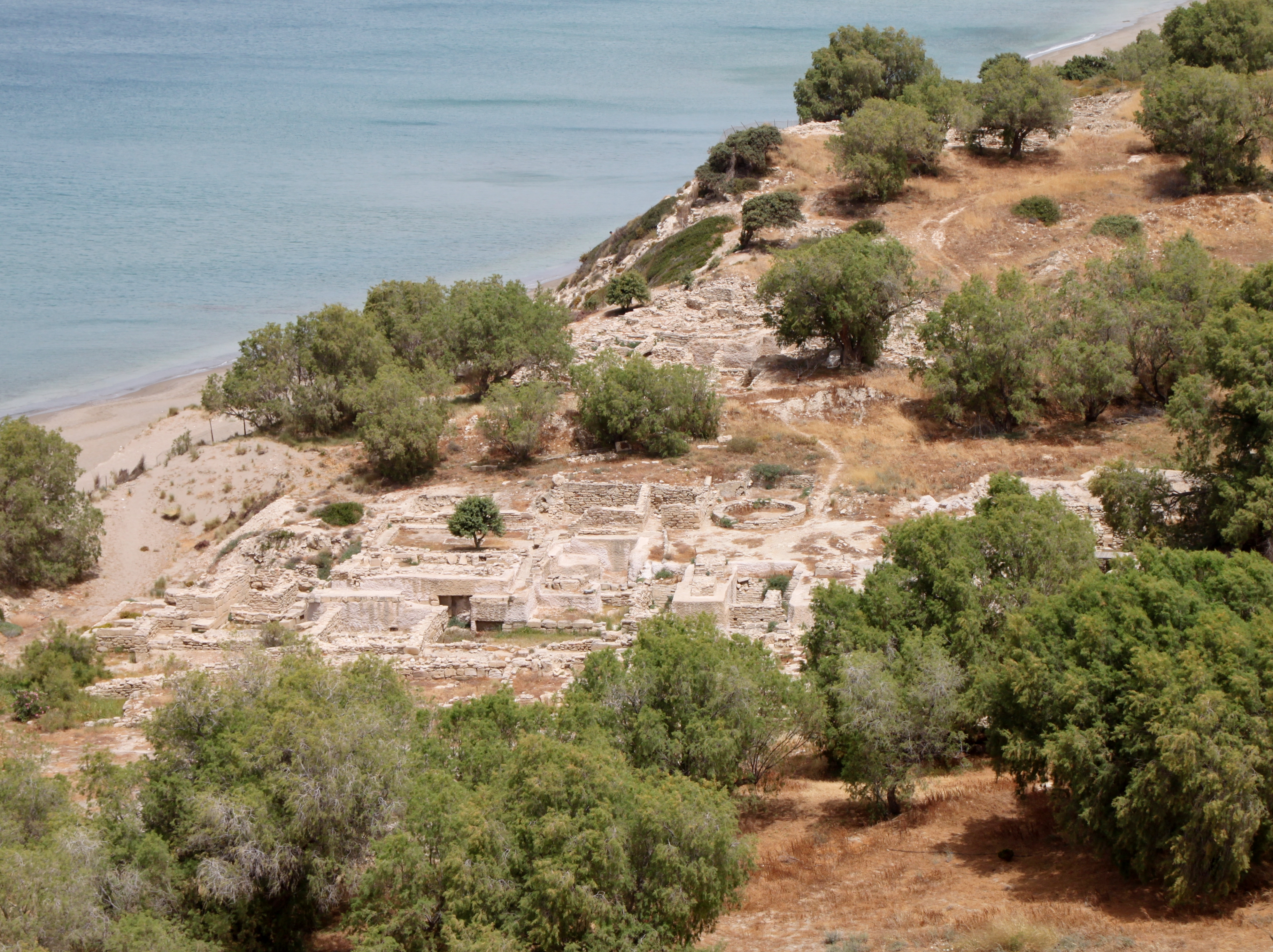 Ausgrabungsstätte der antiken Küstensiedlung Komos (auch Kommos), Gemeinde Tymbaki, Präfektur Iraklio, Kreta, Griechenland